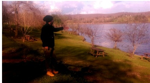 poyrazlar gölünün kuzey görününmü